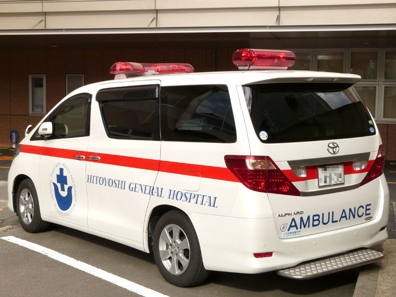 アルファードを改造した病院救急車。